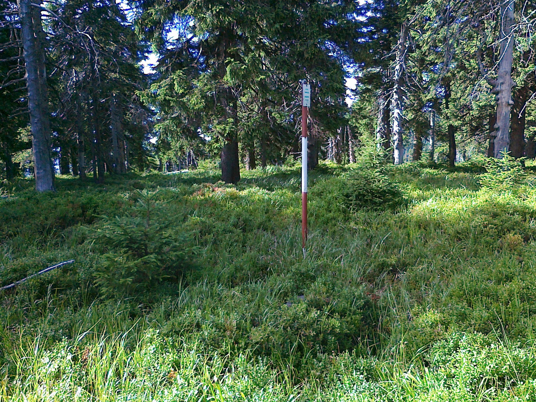 Punkt geodezyjny na szczycie góry Spálený vrch